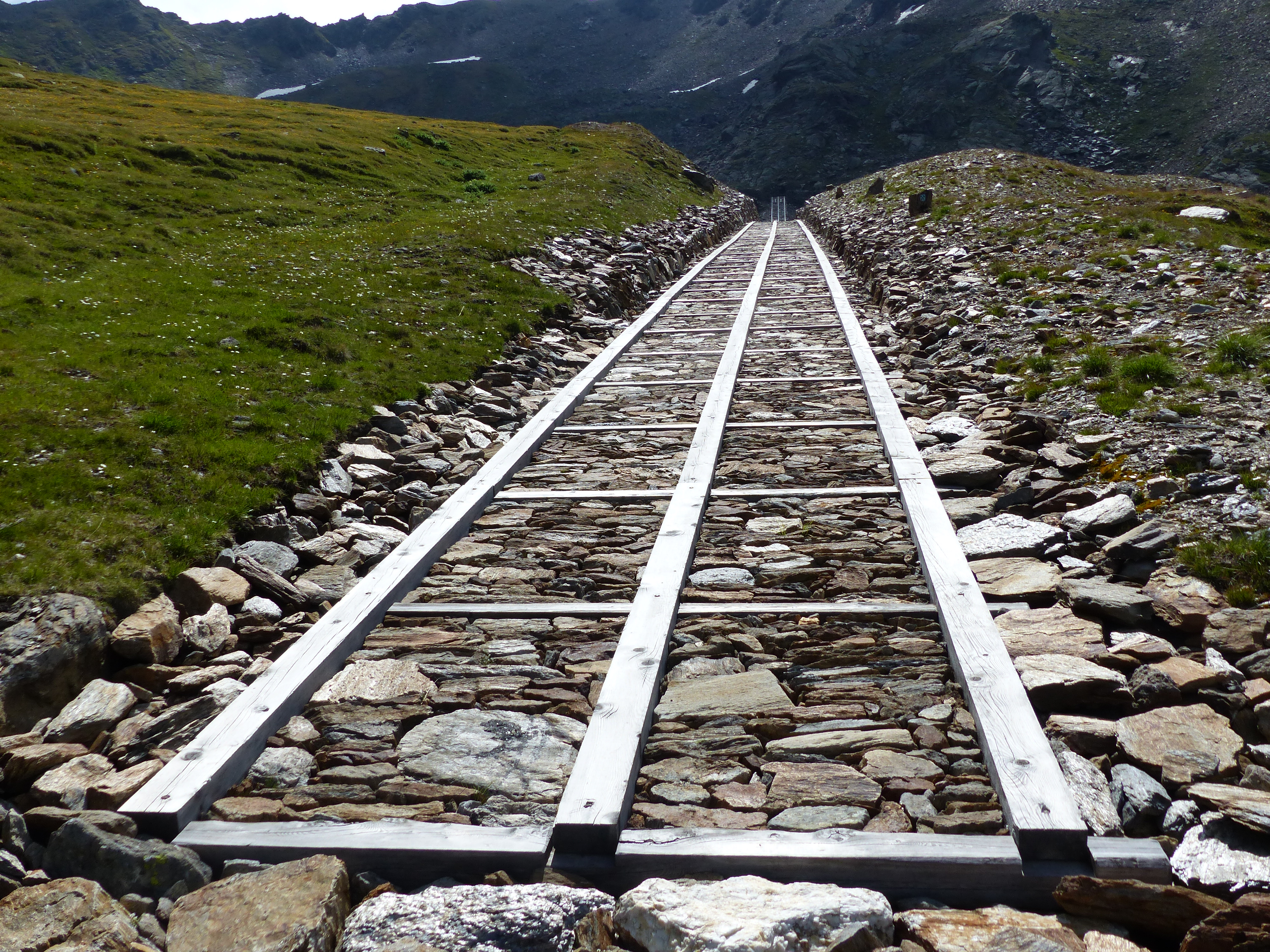 Ehemaliger 14-Nothelfer-Wassertonnen-Aufzug oberhalb von St. Martin im Bergbaugebiet Schneeberg